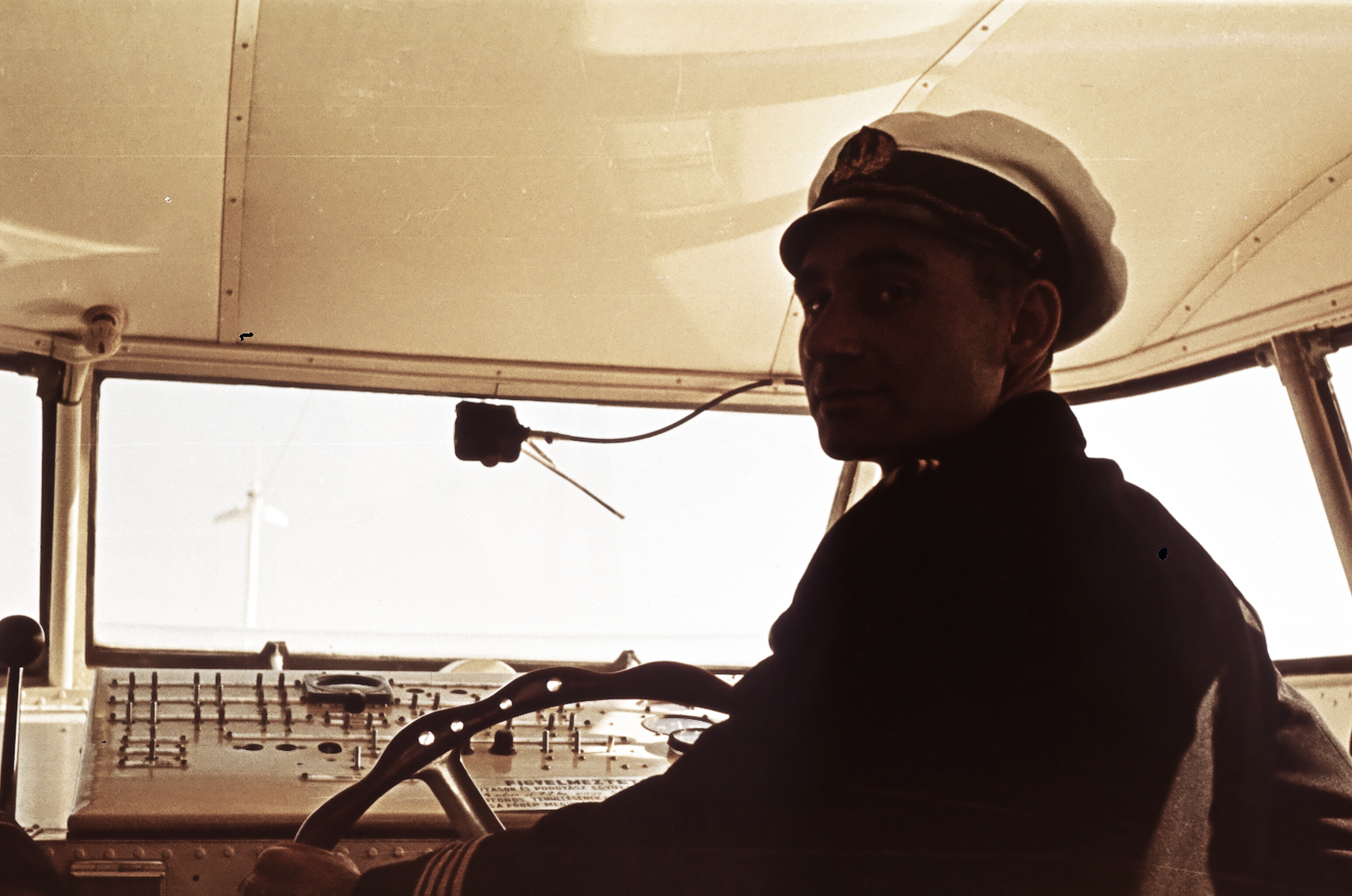 Sirály szárnyashajó. Location: Hungary Tags: ship, colorful, hydrofoil, Ship's wheel, sailor, Sirály I. ship Title: Sirály szárnyashajó.